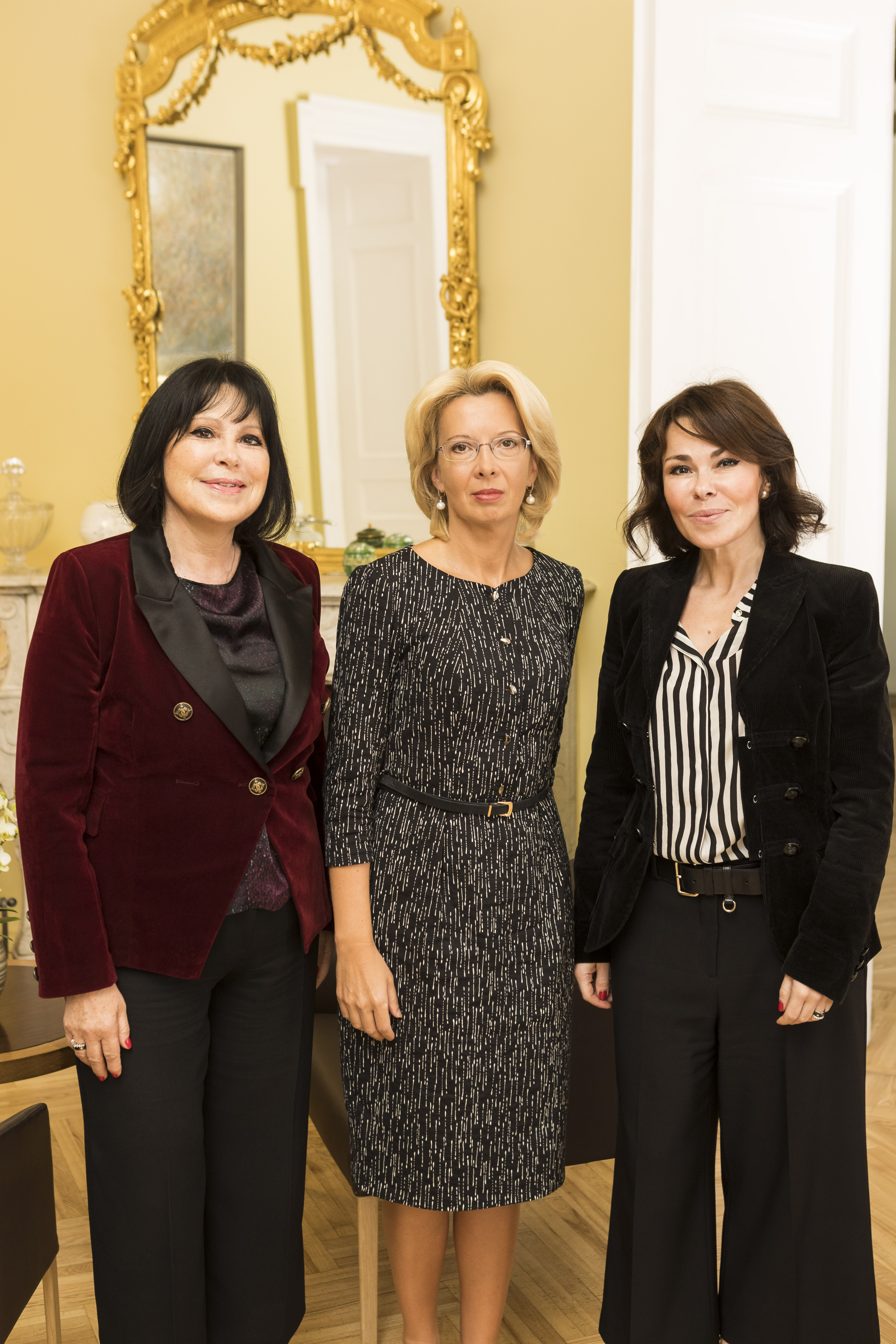 2017.gada 29.augusts. Saeimas priekšsēdētāja Ināra Mūrniece tiekas ar operdziedātāju Inesi Galanti un Ineses Galantes Fonda direktori Diānu Galanti. Foto: Reinis Inkēns, Saeimas Administrācija Izmantošanas noteikumi: saeima.lv/lv/autortiesibas